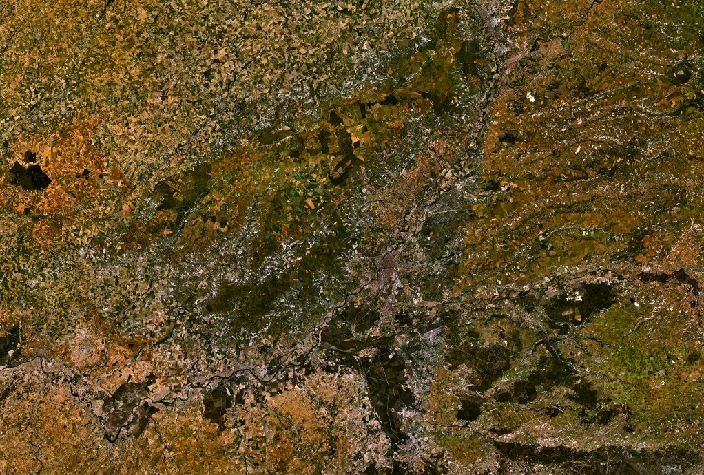 Vista satélite de la provincia de Valladolid